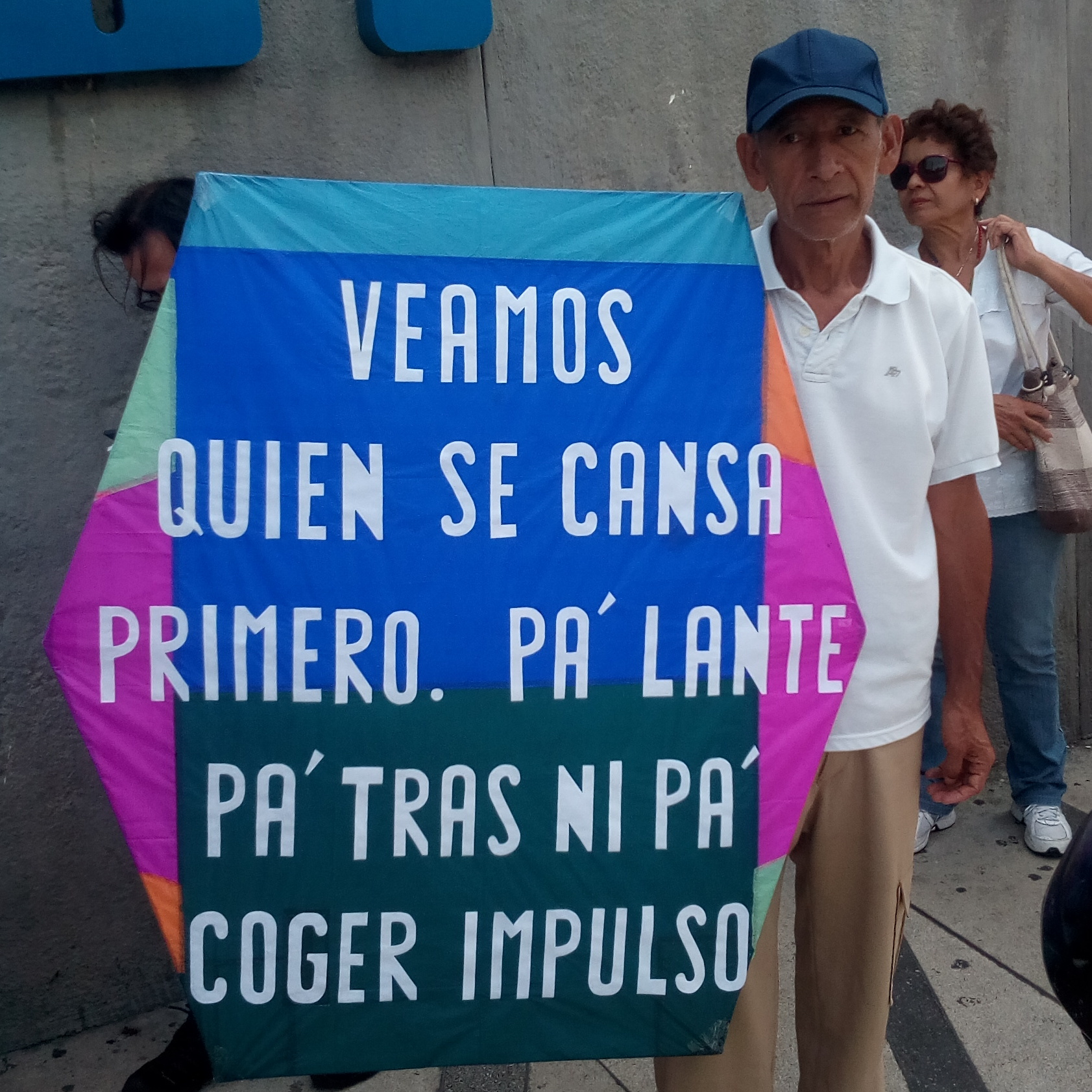 Rafael Araujo, el "Señor Papagayo"